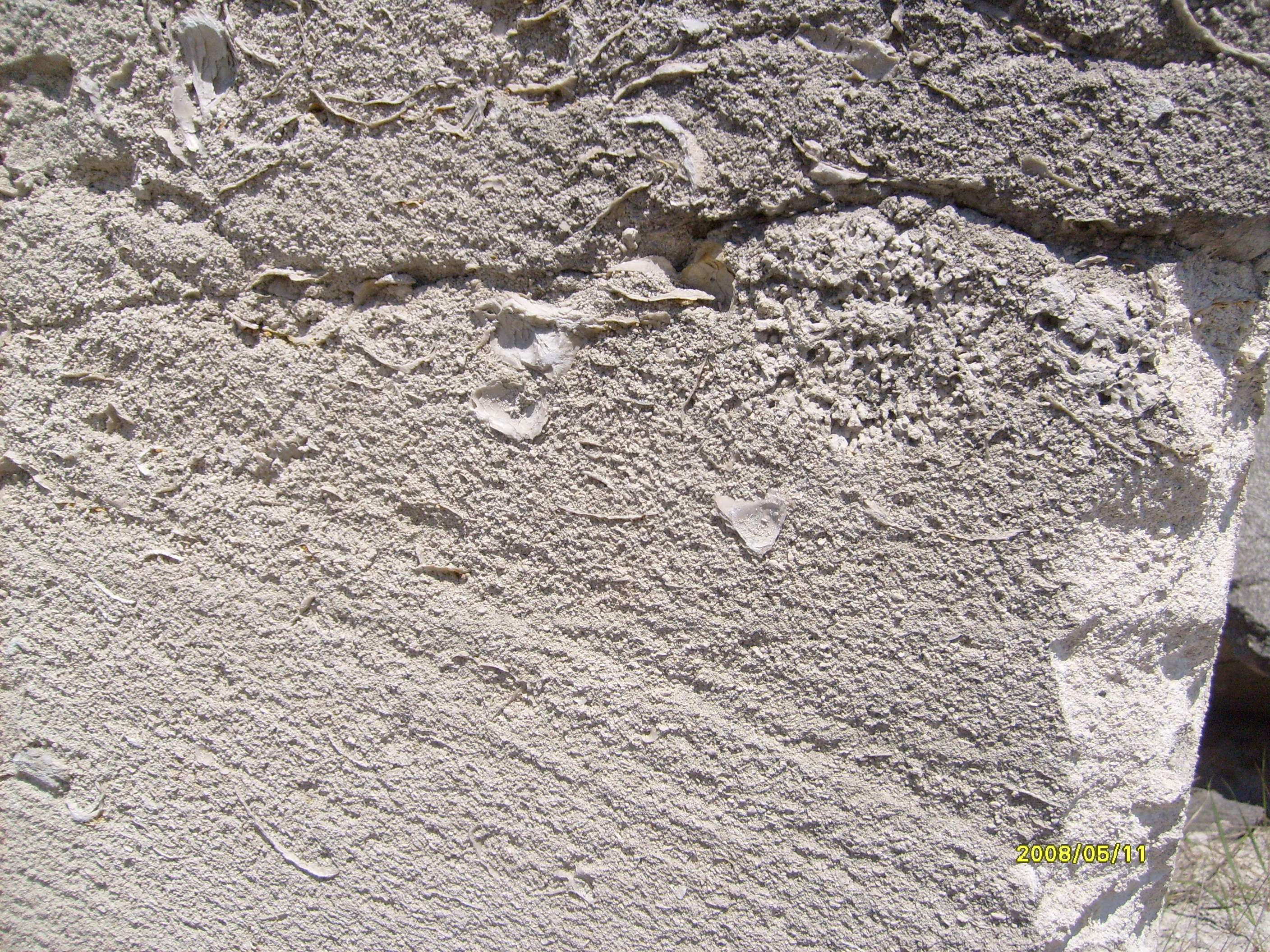 Fertőrákosi lezárt kőfejtő: lajtamészkő ősmaradványokkal